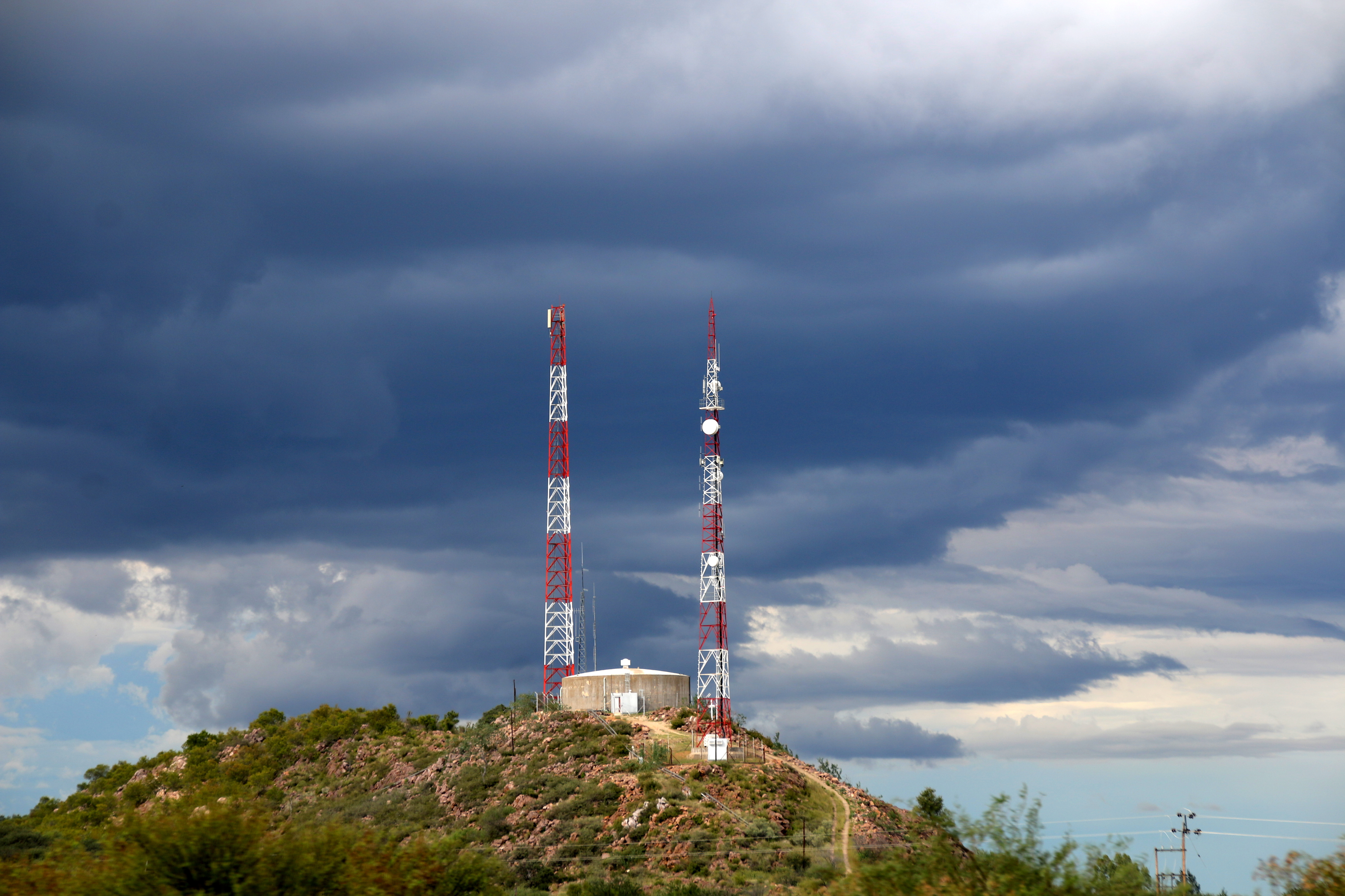 Das Wahrzeichen Witvleis, Sendemasten (2018)